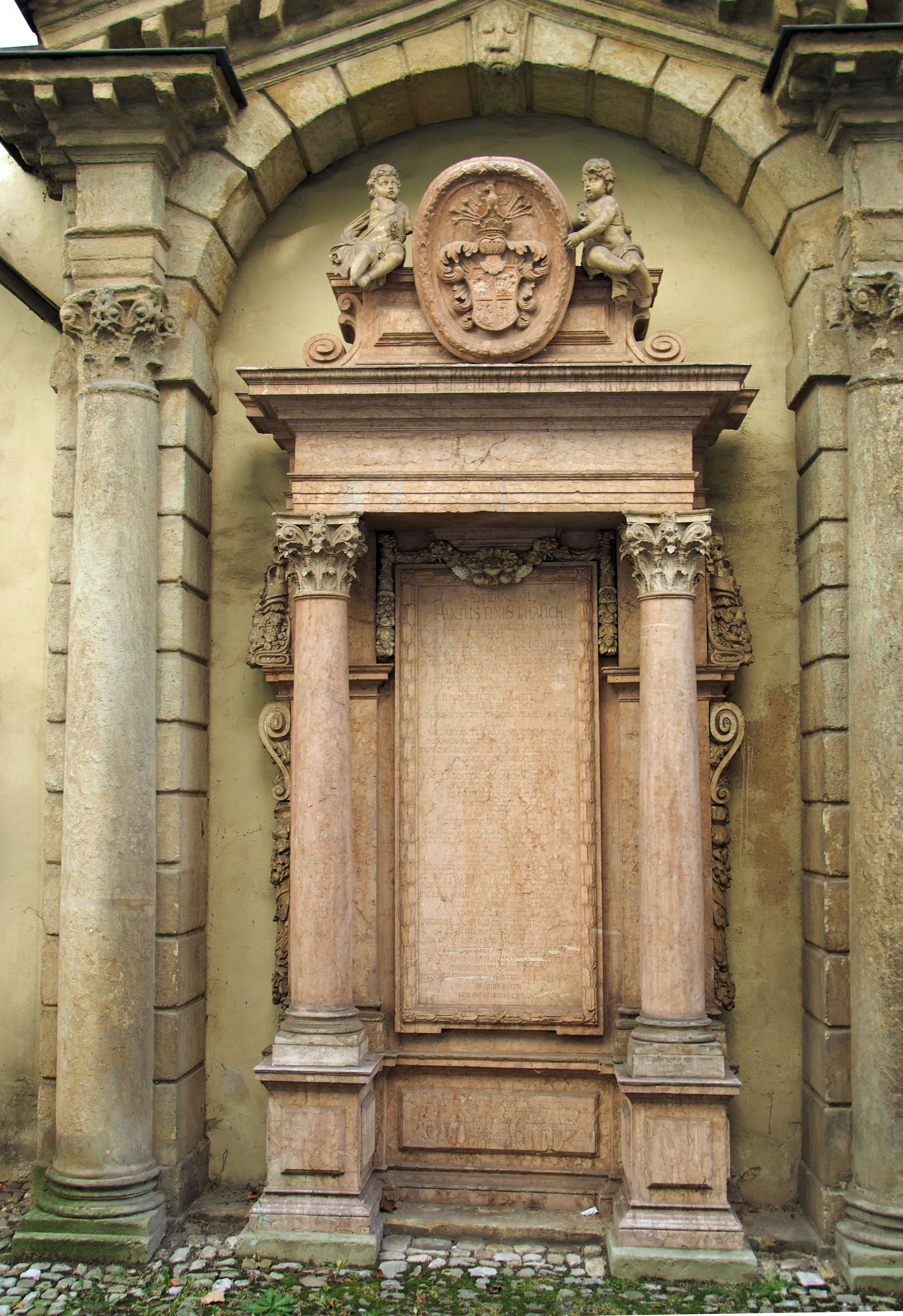 Epitaph Augustin Strauch († 18. Mai 1674), Geheimer Rat und Bevollmächtigter Gesandter des Kurfürstentums Sachsen. Auf dem Gesandtenfriedhof an der Dreieinigkeitskirche Regensburg (Südseite)